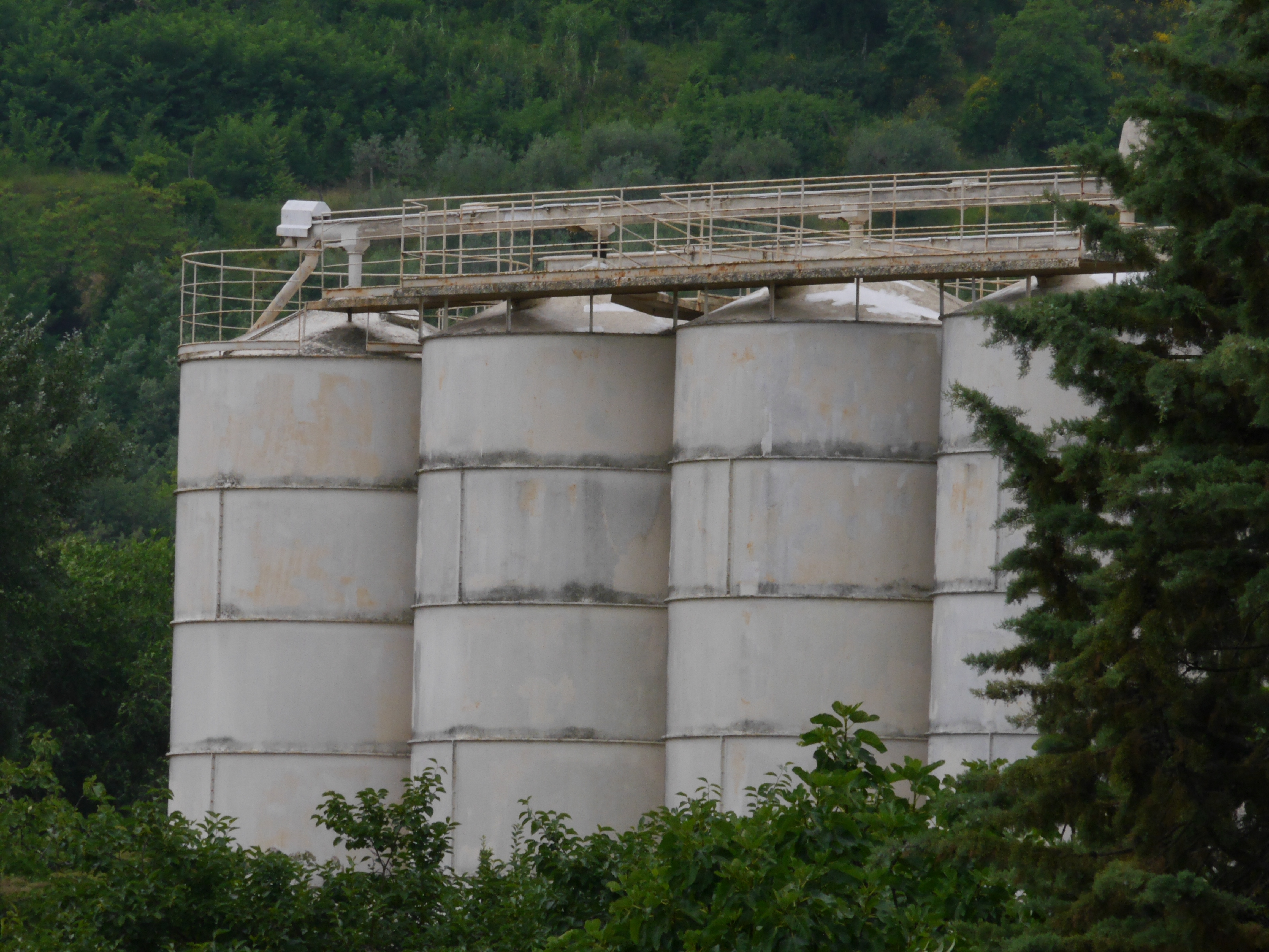 This photo was taken with Panasonic Lumix DMC-G6 camera, thanks to Panasonic. You can see all photographs in category: Taken with Panasonic Lumix DMC-G6.